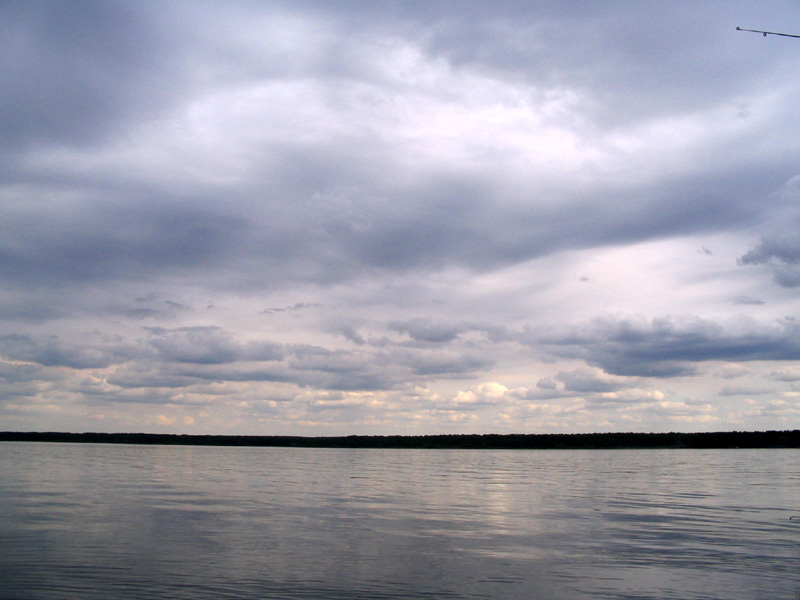 Копёнки.Курская область.Россия.